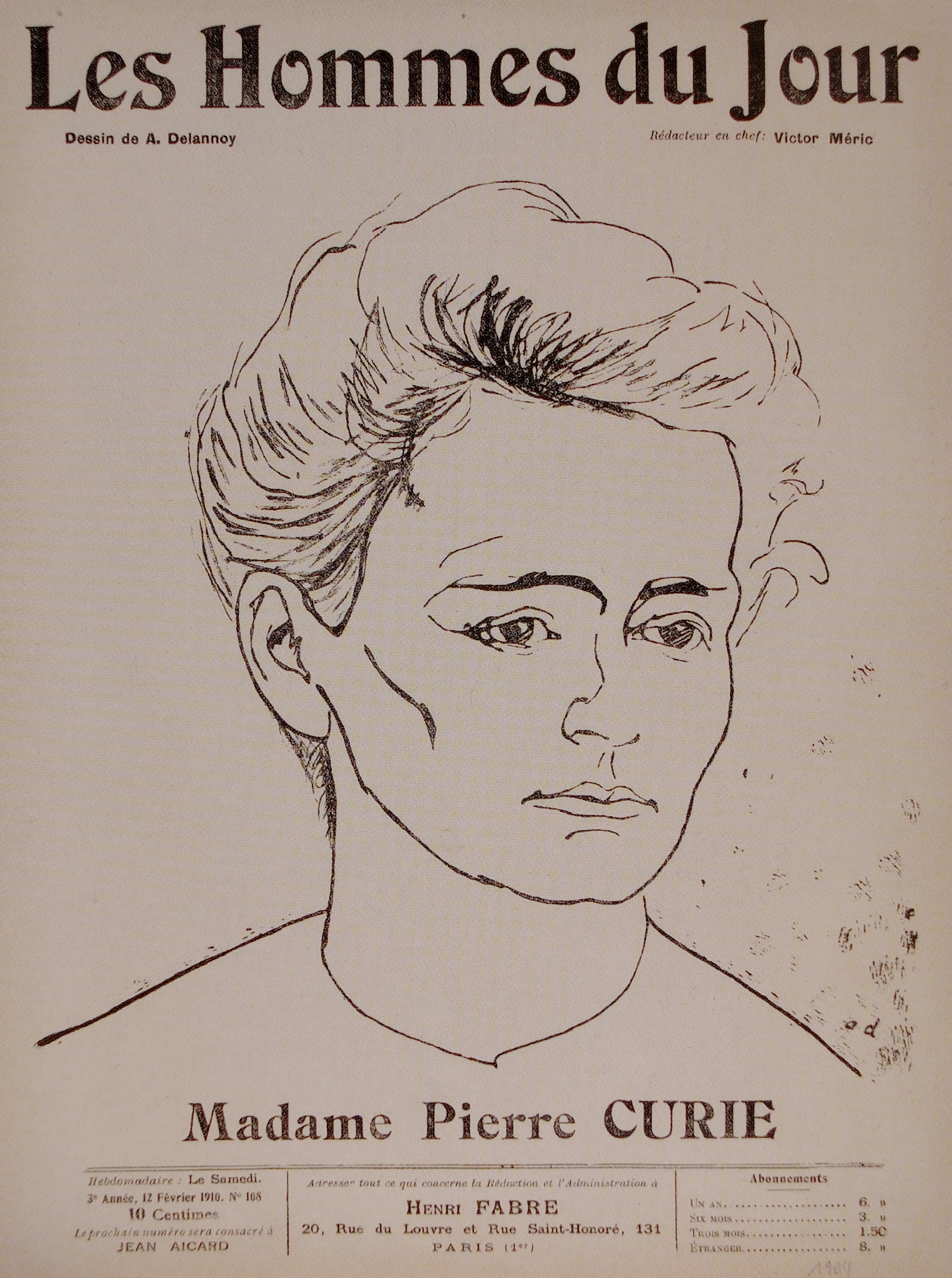 Les Hommes du Jour, n°108 du samedi 12 février 1910. Portrait de Marie Curie par Aristide Delanoy.